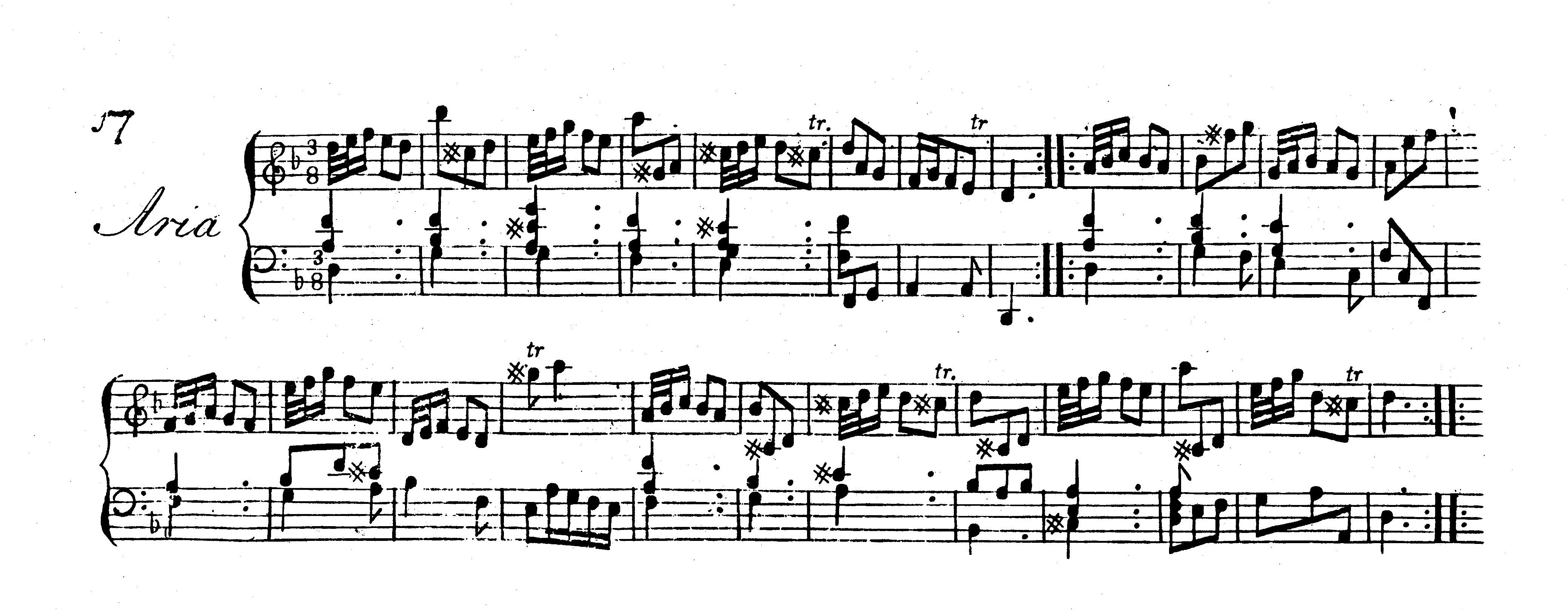 La sonate K. 32, telle qu'elle se présente dans l'édition Roseingrave publiée à Londres en 1739 dans un recueil de 42 sonates.